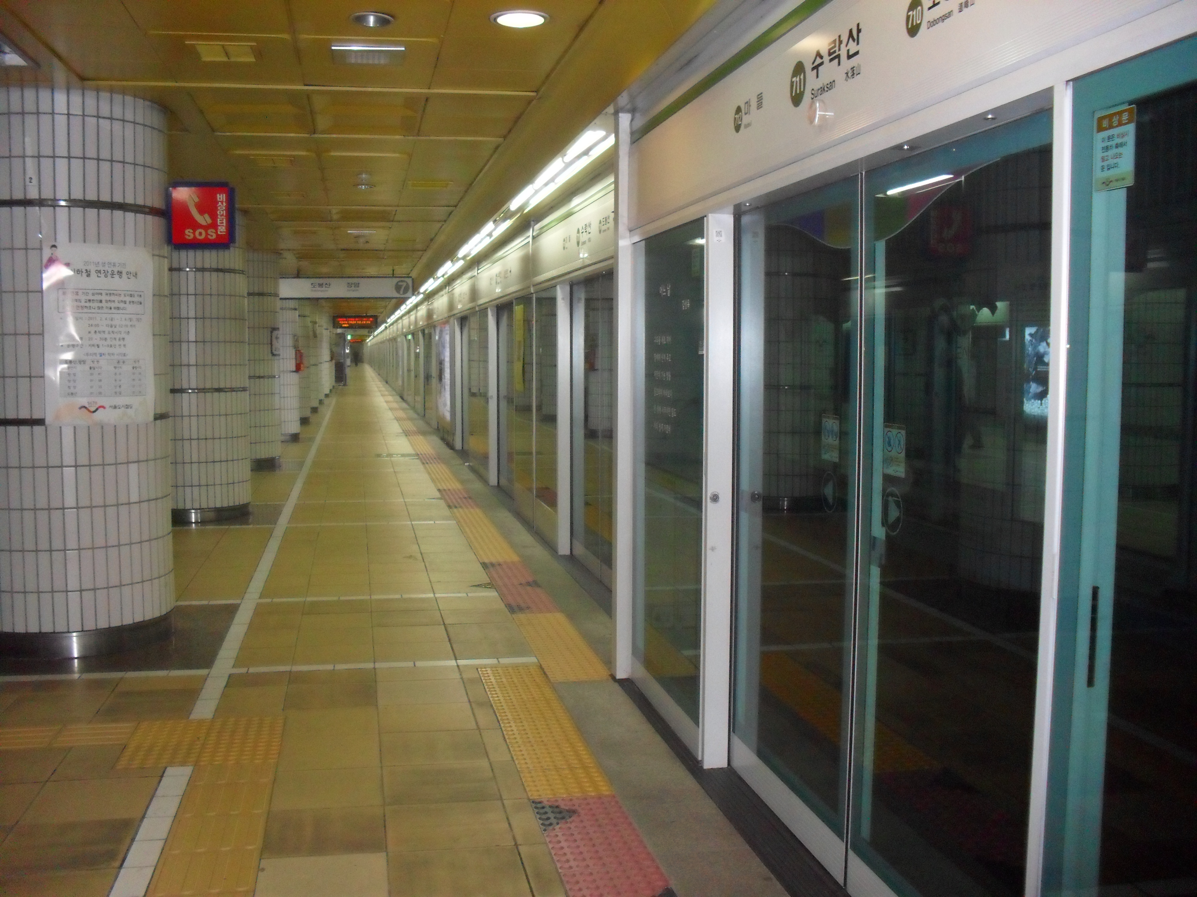 水落山駅ホーム（中線）